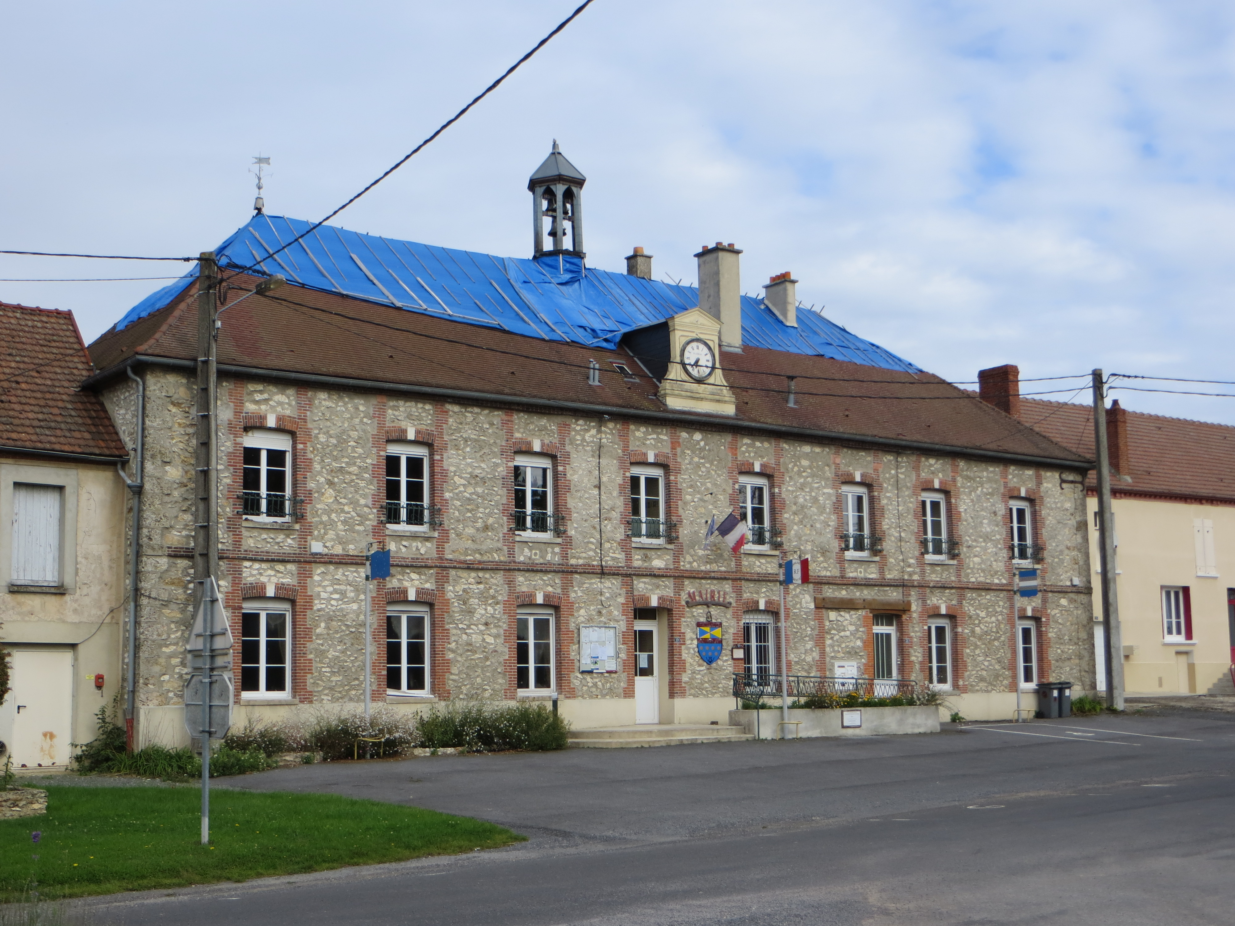 Mairie